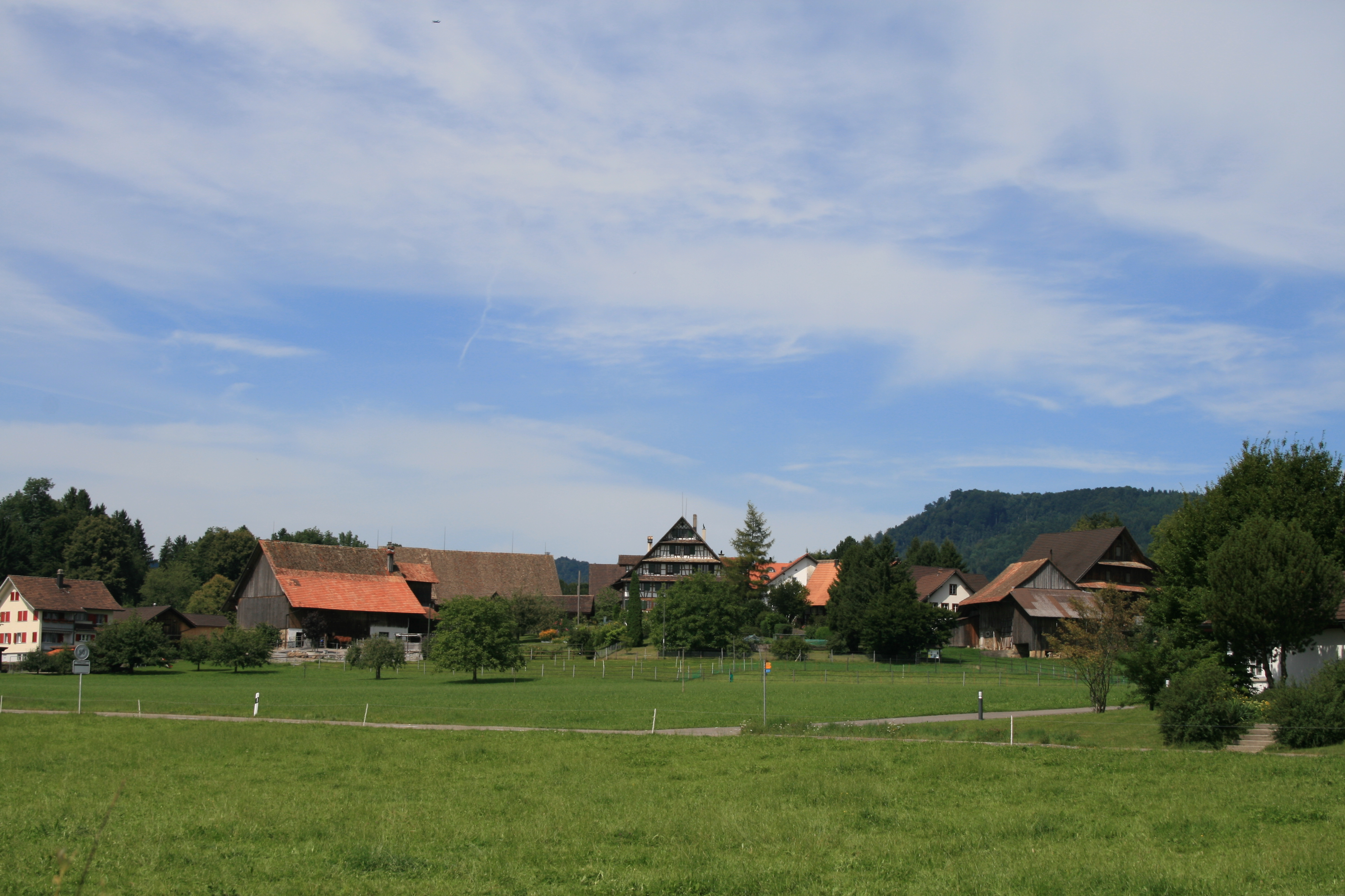 Näfehüsere, Chappel am Albis, Schwiiz